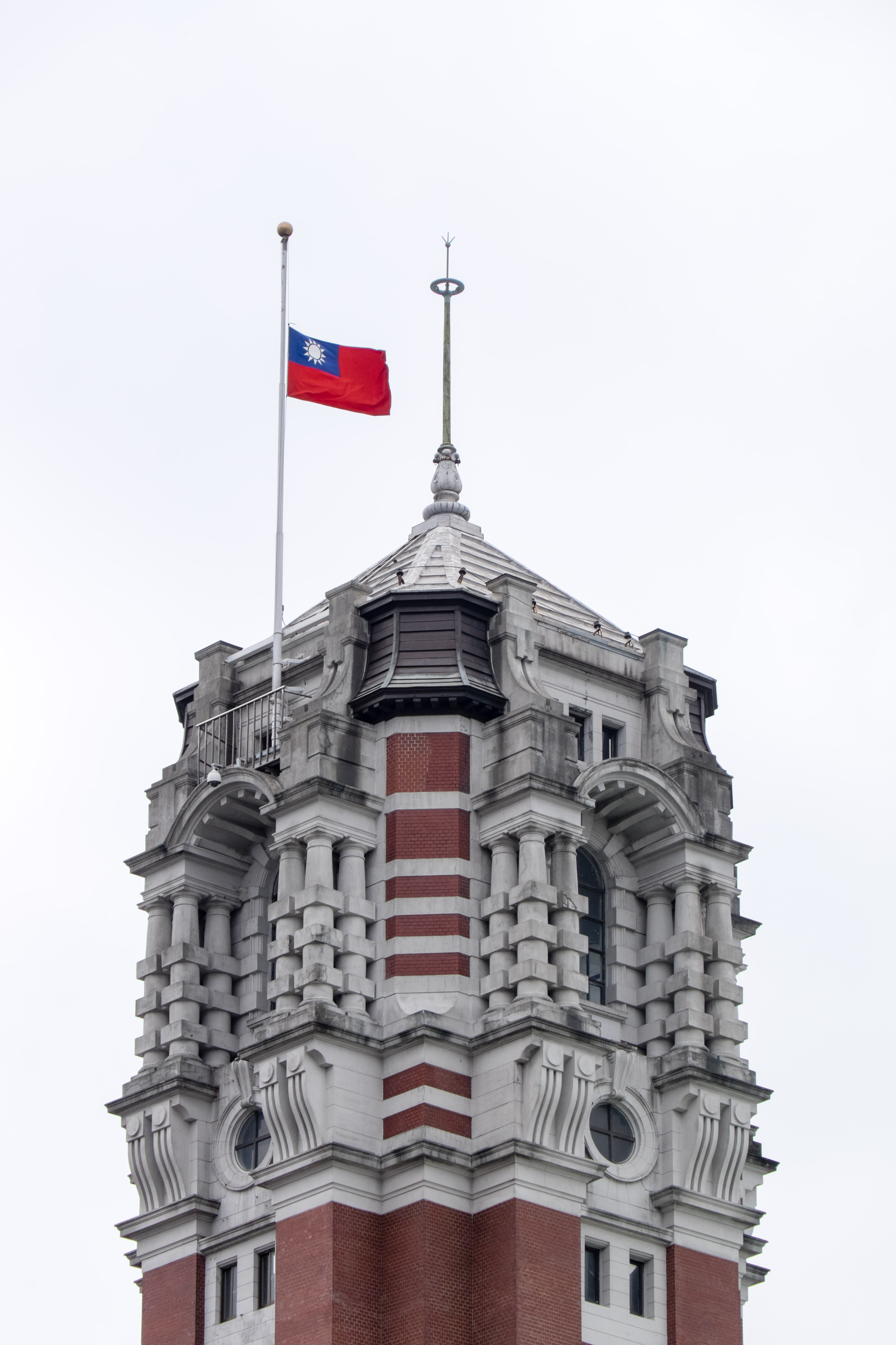 2015年2月10日復航GE235班次空難頭七，行政院通令全國機關學校等下半旗一日，總統府主塔下半旗以示舉國同悲。